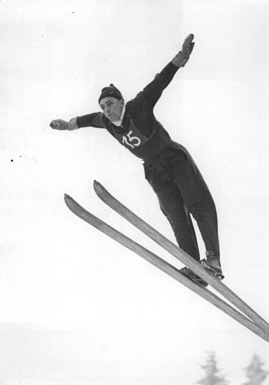 Zentralbild Quasch. 16.2.1953 IV. Wintersportmeisterschaften der Deutschen Demokratischen Republik für Frieden, Einheit, Demokratie und Sozialismus vom 10. - 15.2.1953 in Oberhof Sondersprunglauf auf der Thüringen-Schanze UBz: Myroslav CSR.